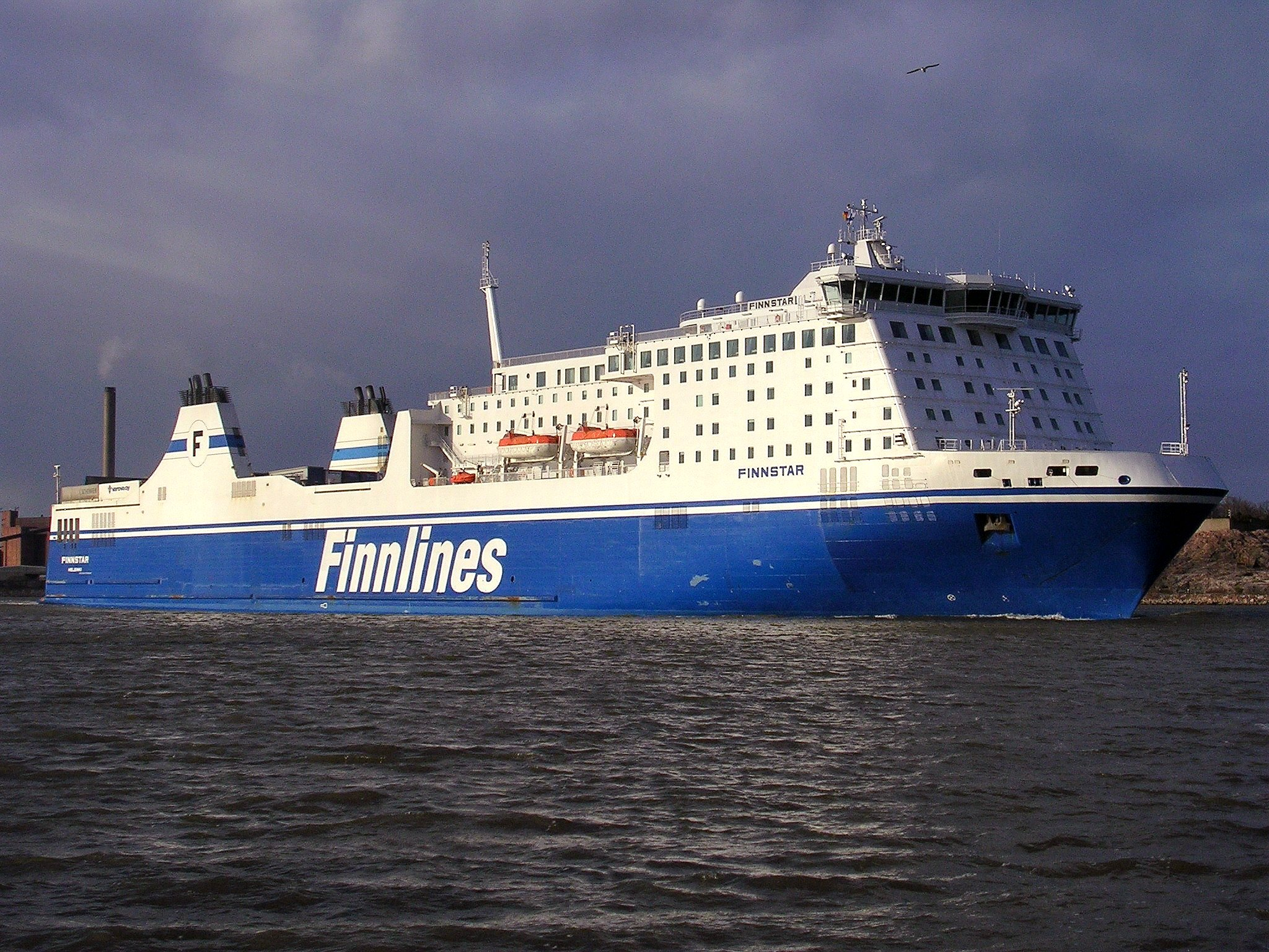 M/S Finnstar departing Sompasaari Harbour, Helsinki for Travemünde on 3rd April 2007. Picture taken by Kalle Id.